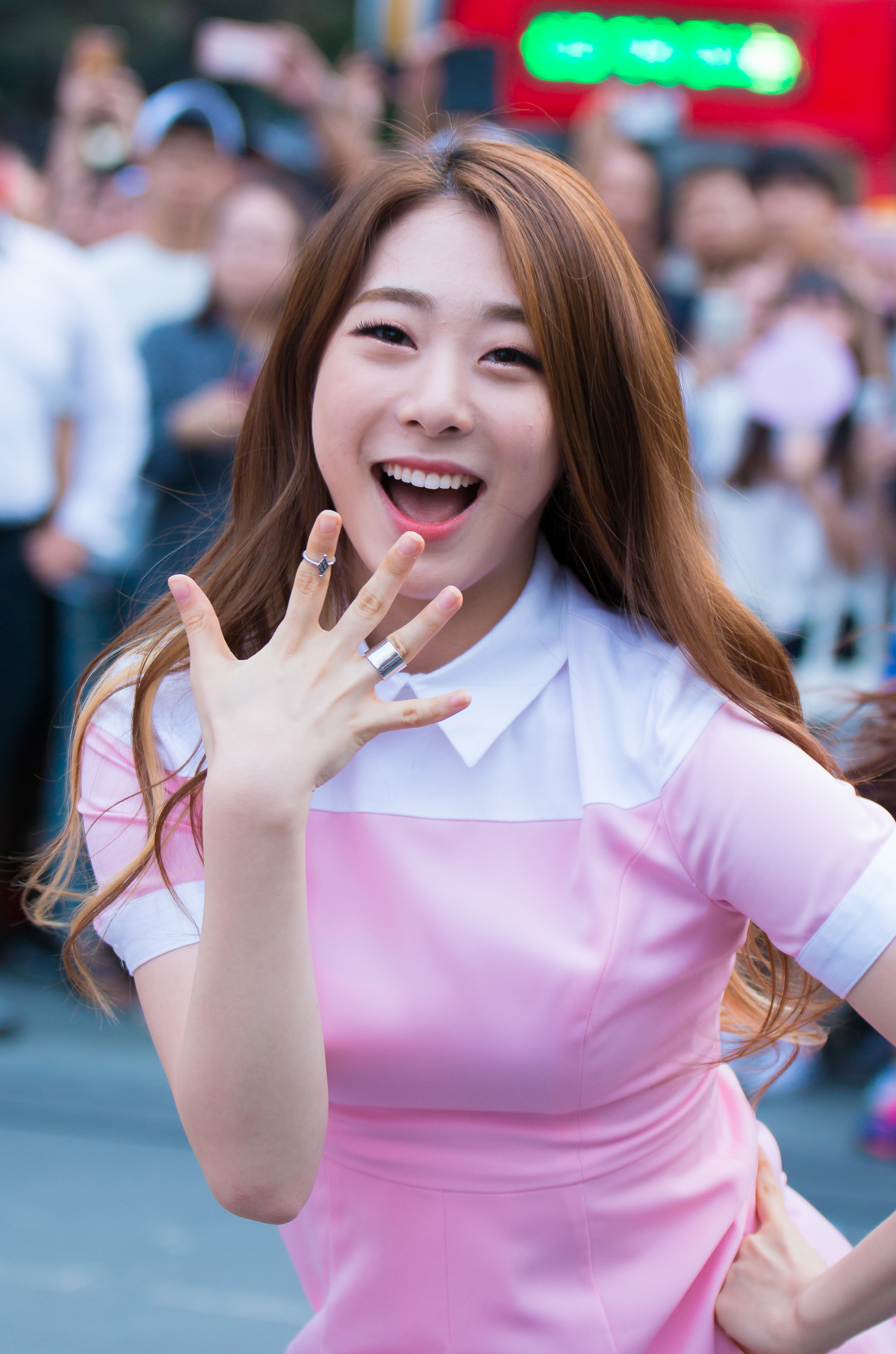 20160910 우주소녀 유연정 신촌 게릴라 공연